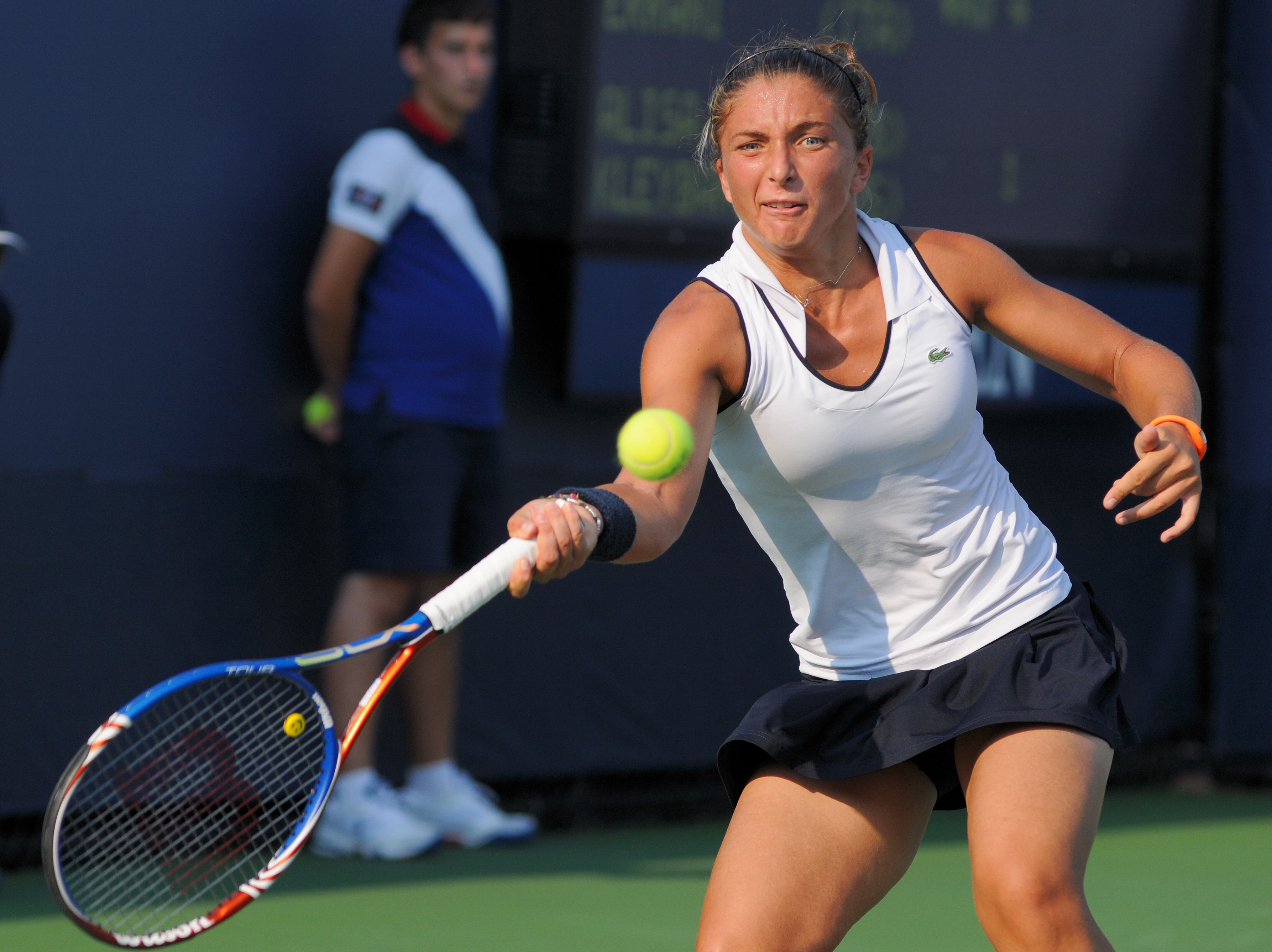 Sara Errani - US Open 2010